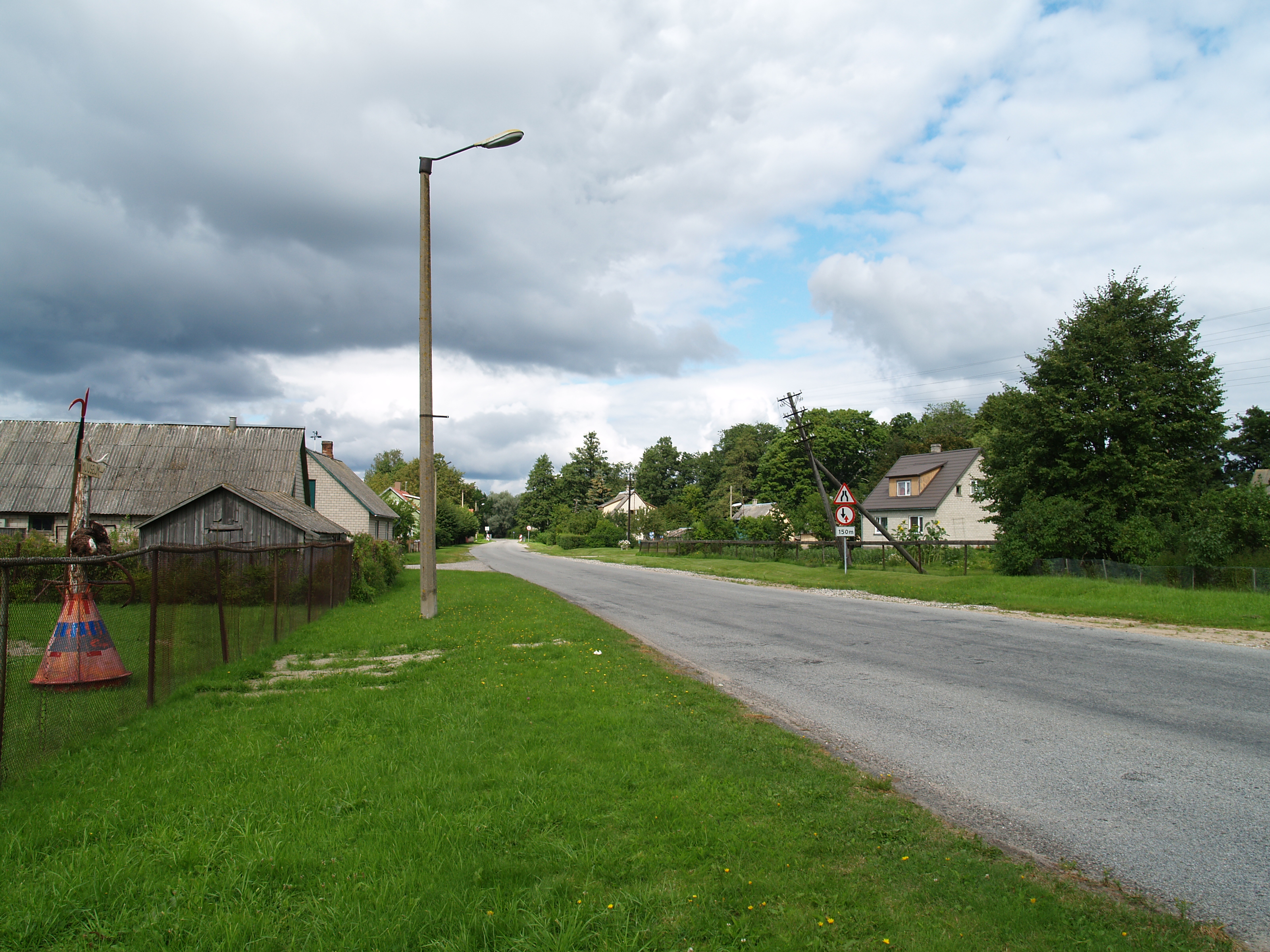 Treimani küla